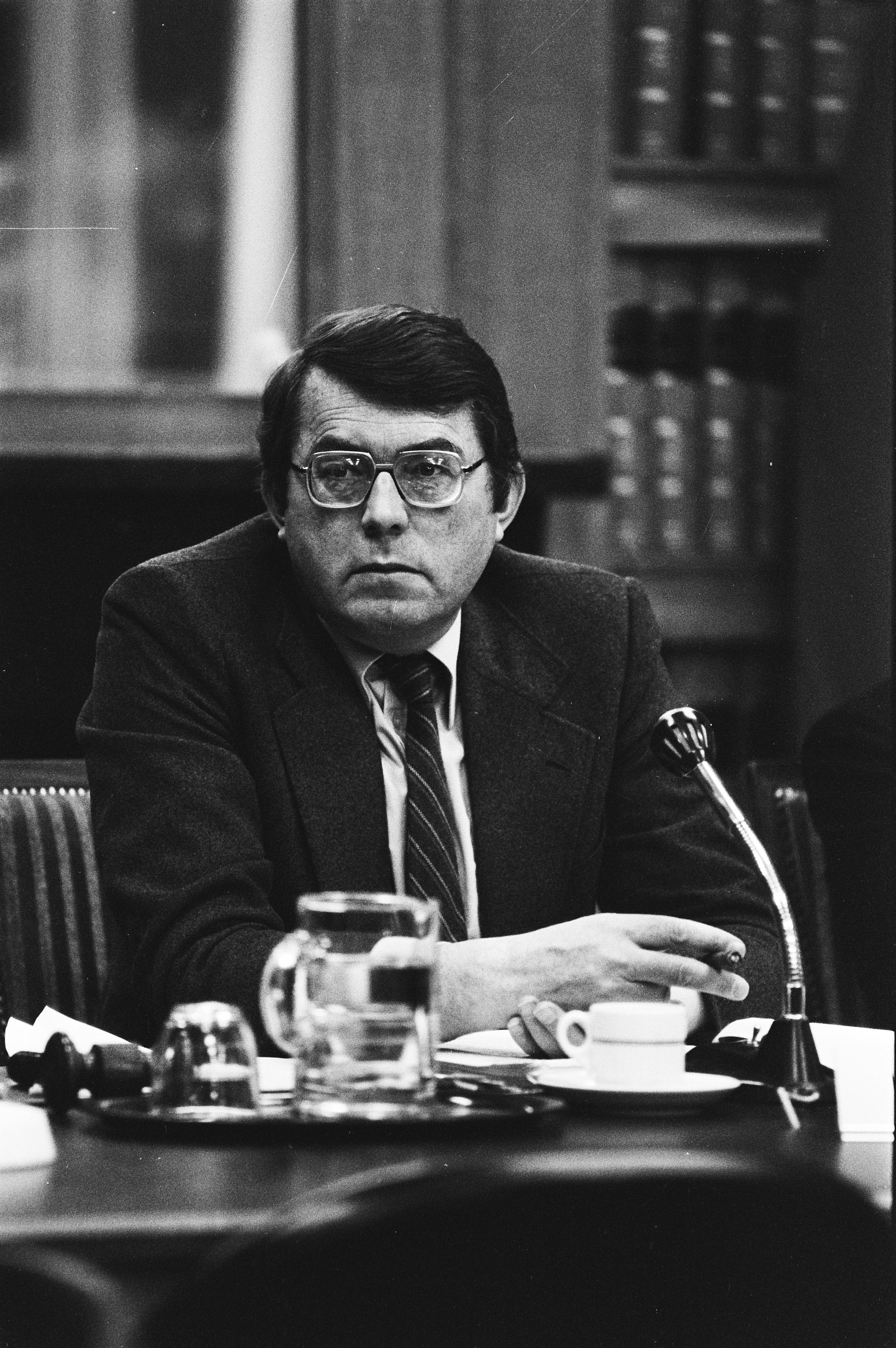 Collectie / Archief : Fotocollectie Anefo Reportage / Serie : Openbare hoorzitting Commissie Kernenergie Beschrijving : Voorzitter Arend Voortman (PvdA) Datum : 26 november 1979 Locatie : Den Haag, Zuid-Holland Trefwoorden : hoorzittingen, kernenergie, portretten, voorzitters Persoonsnaam : Voortman, A.J. Instellingsnaam : PvdA, Tweede Kamer Fotograaf : [onbekend] Auteursrechthebbende : Nationaal Archief Materiaalsoort : Negatief (zwart/wit) Nummer archiefinventaris : bekijk toegang 2.24.01.05 Bestanddeelnummer : 930-5596